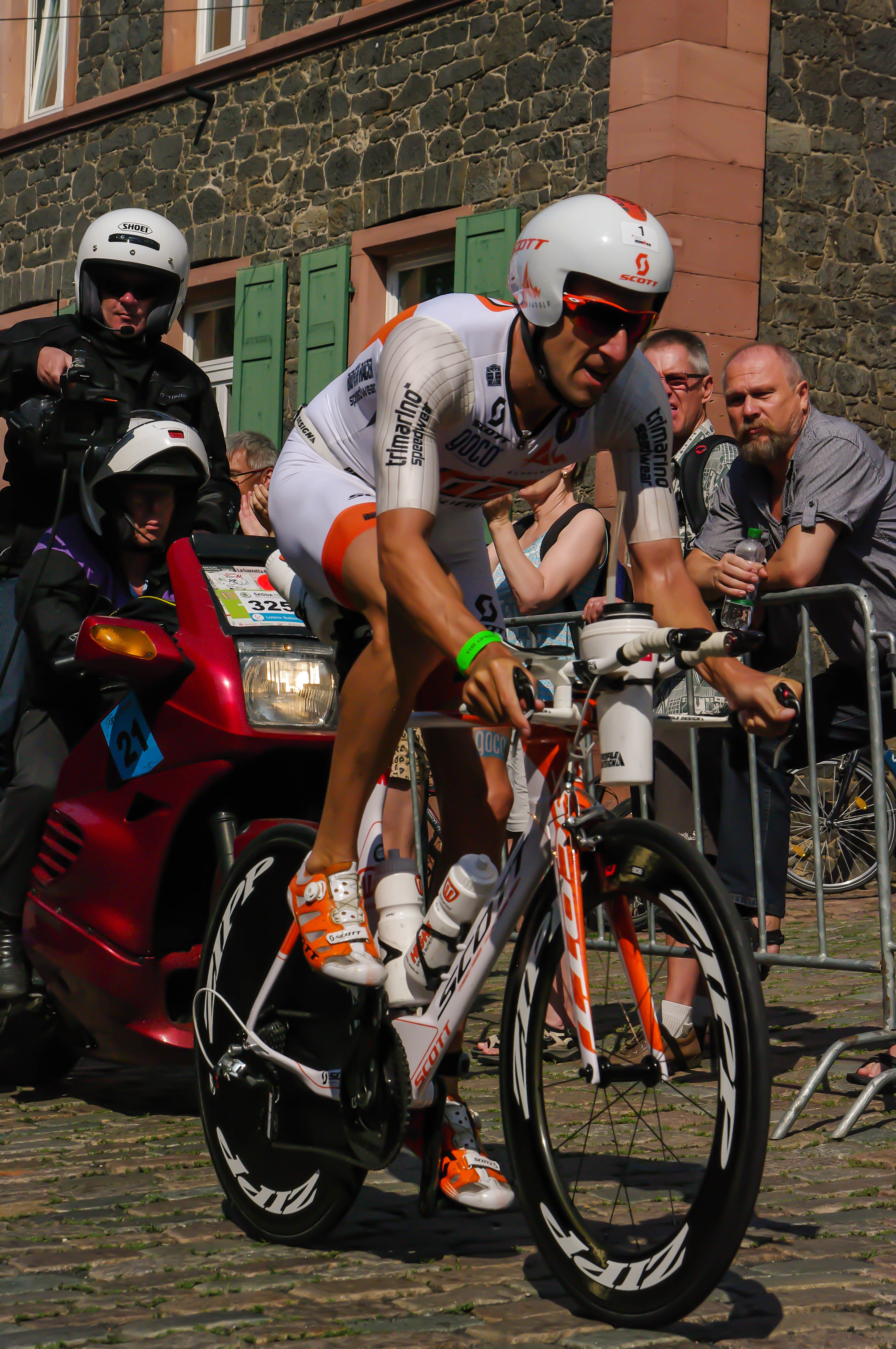 Marino Vanhoenacker Ironman 2013 Frankfurt